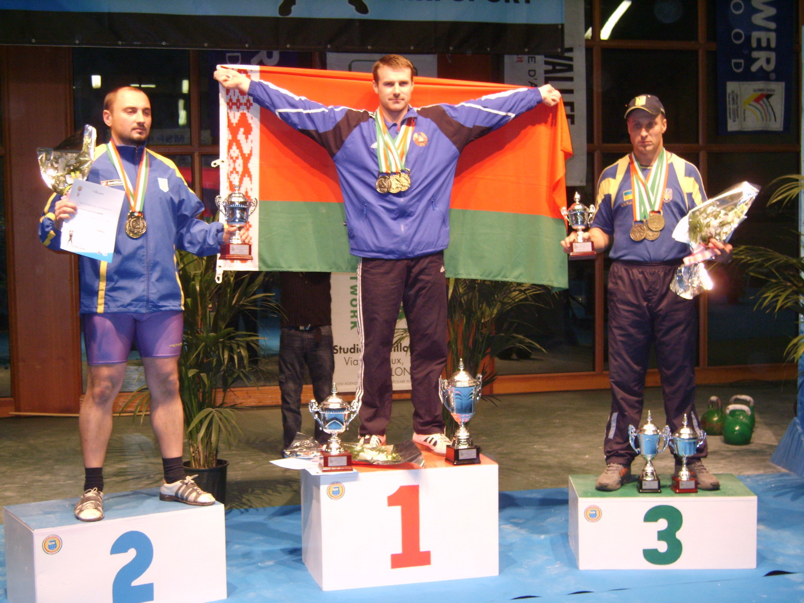 Чемпионат мира по гиревому спорту (двоеборье). Вадим Сигневич (Белоруссия) Занял первое место в весовой категории 90 кг.